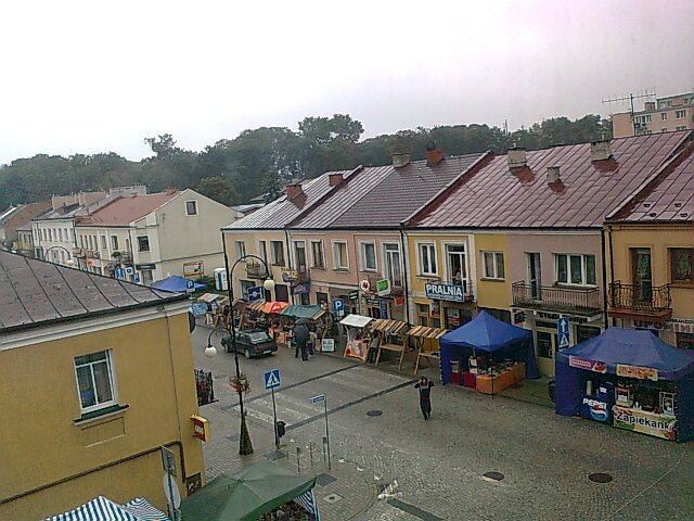 Ryki, Weekend z LRY 2012, 26 sierpień 2012